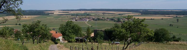 Panorma de clérey-la-Côte de GODARD Florian